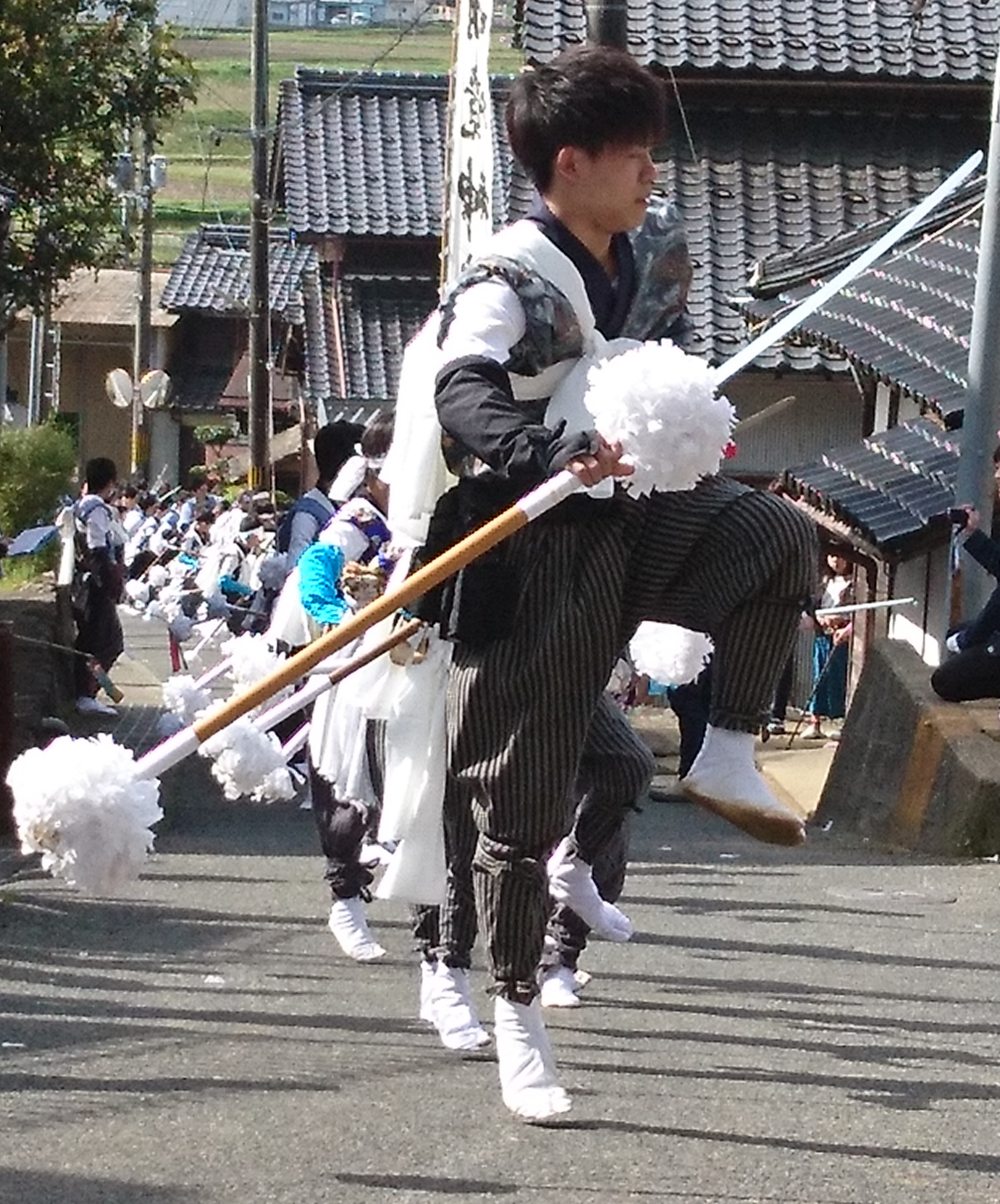 明境神社 加悦谷祭